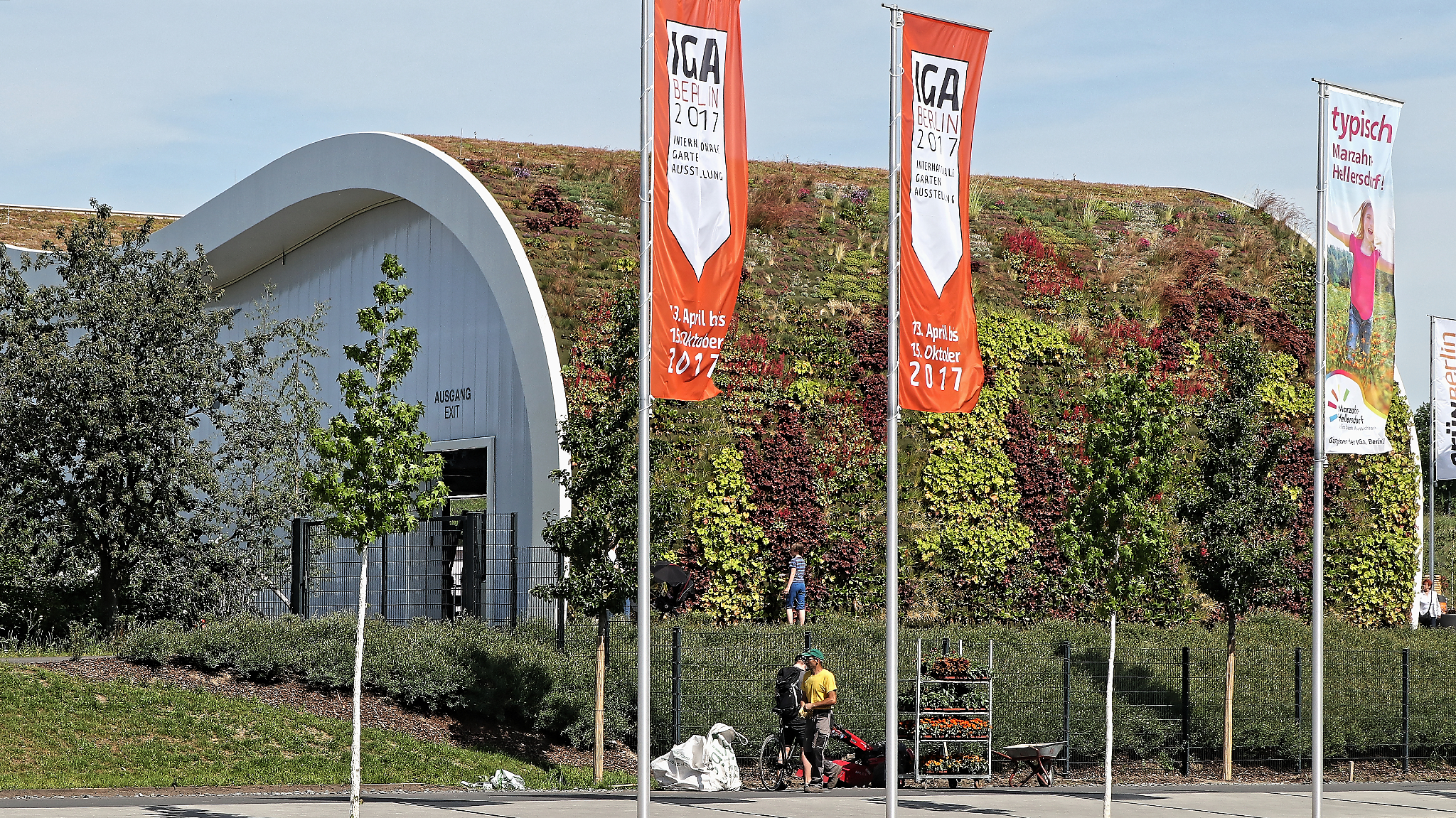 Eingang mit IGA-Fahnen und Dachbegrünung